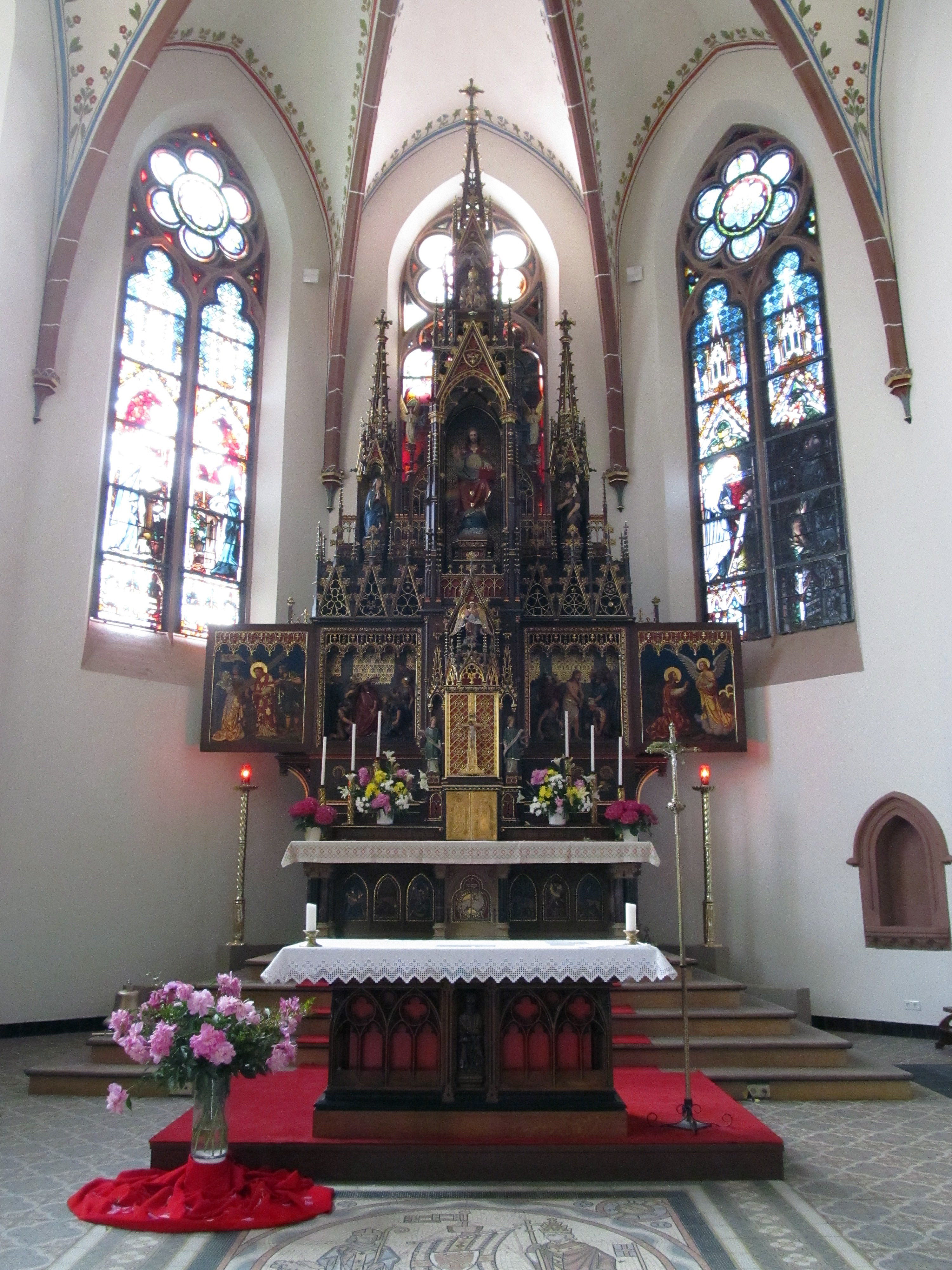 Der Hochaltar in der Kirche St. Josef in St. Ingbert